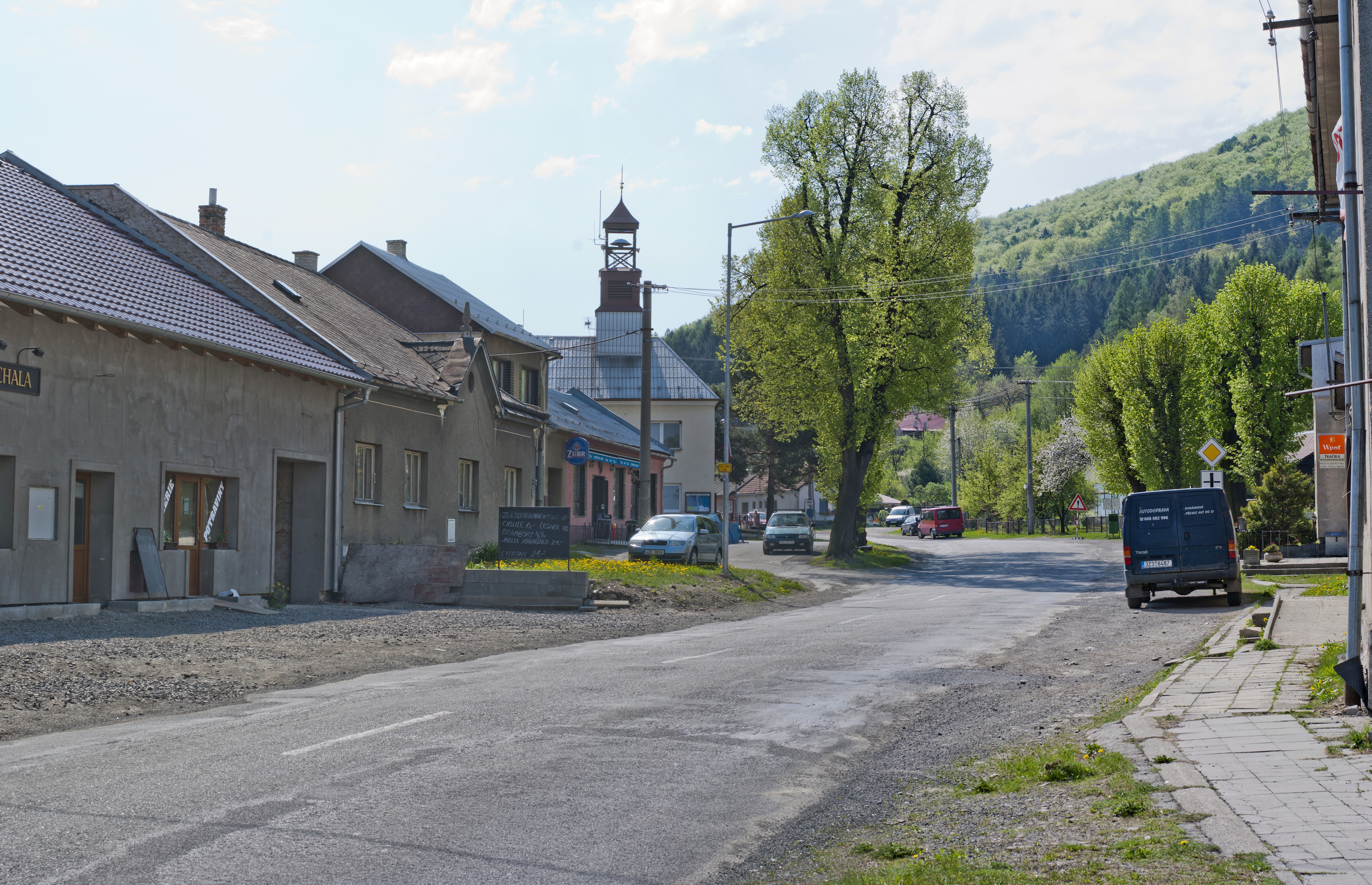 Pohled na hospodu a hasičárnu